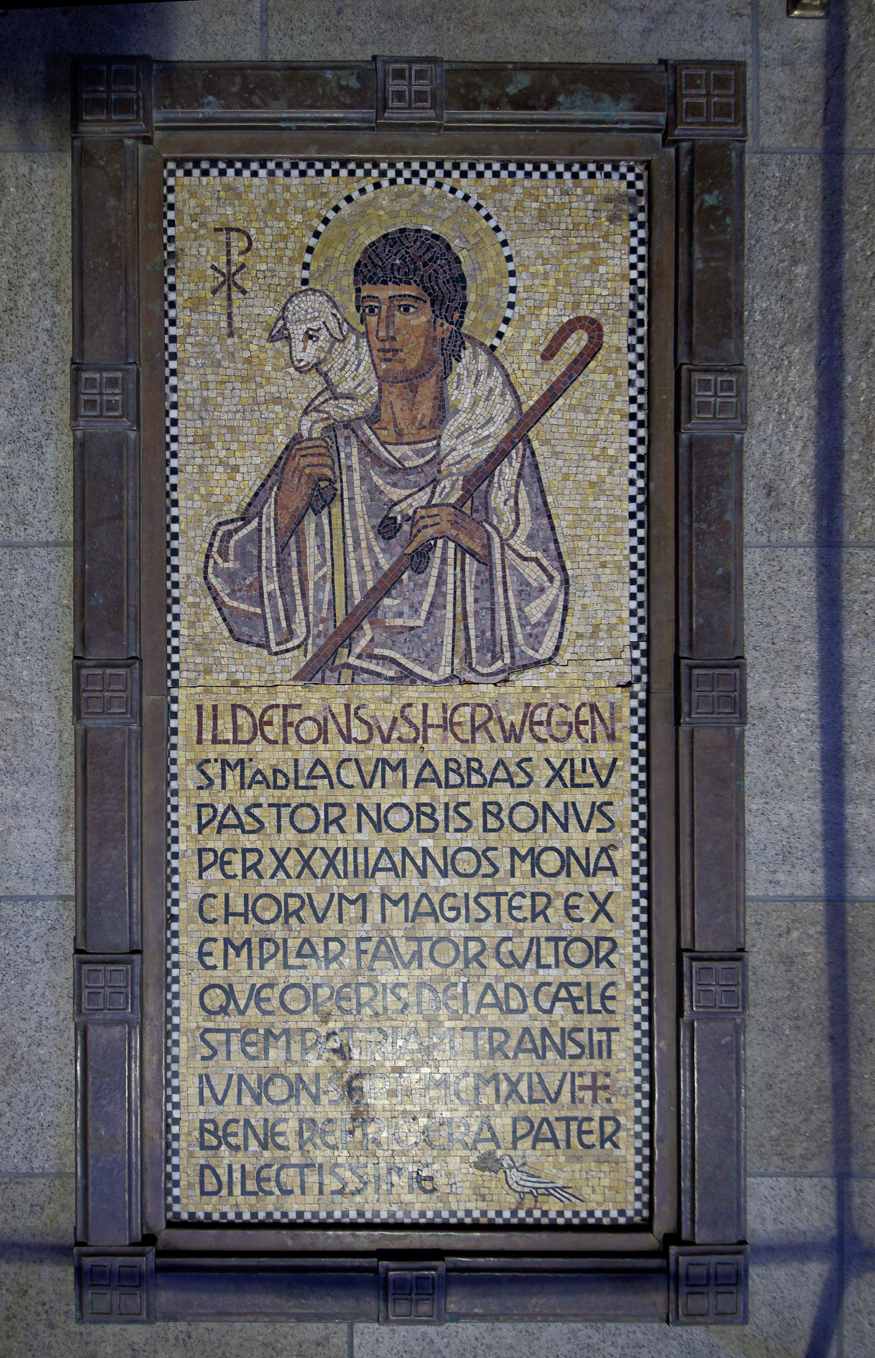 Grabmosaik für den Abt Ildefons Herwegen, Abt von 1913 - 1946, in der Abteikirche Maria Laach. Glees (RP), Denkmalzone Maria Laach.